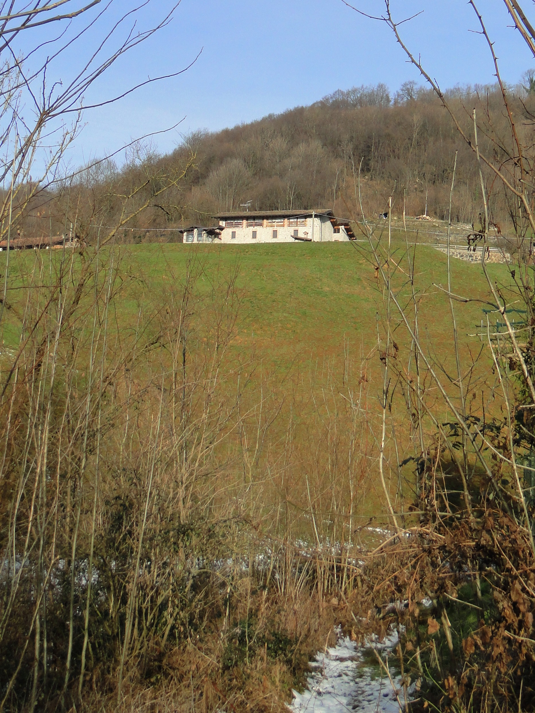 valle del Gaggio. Cazzano Sant'Andrea (BG). Italy